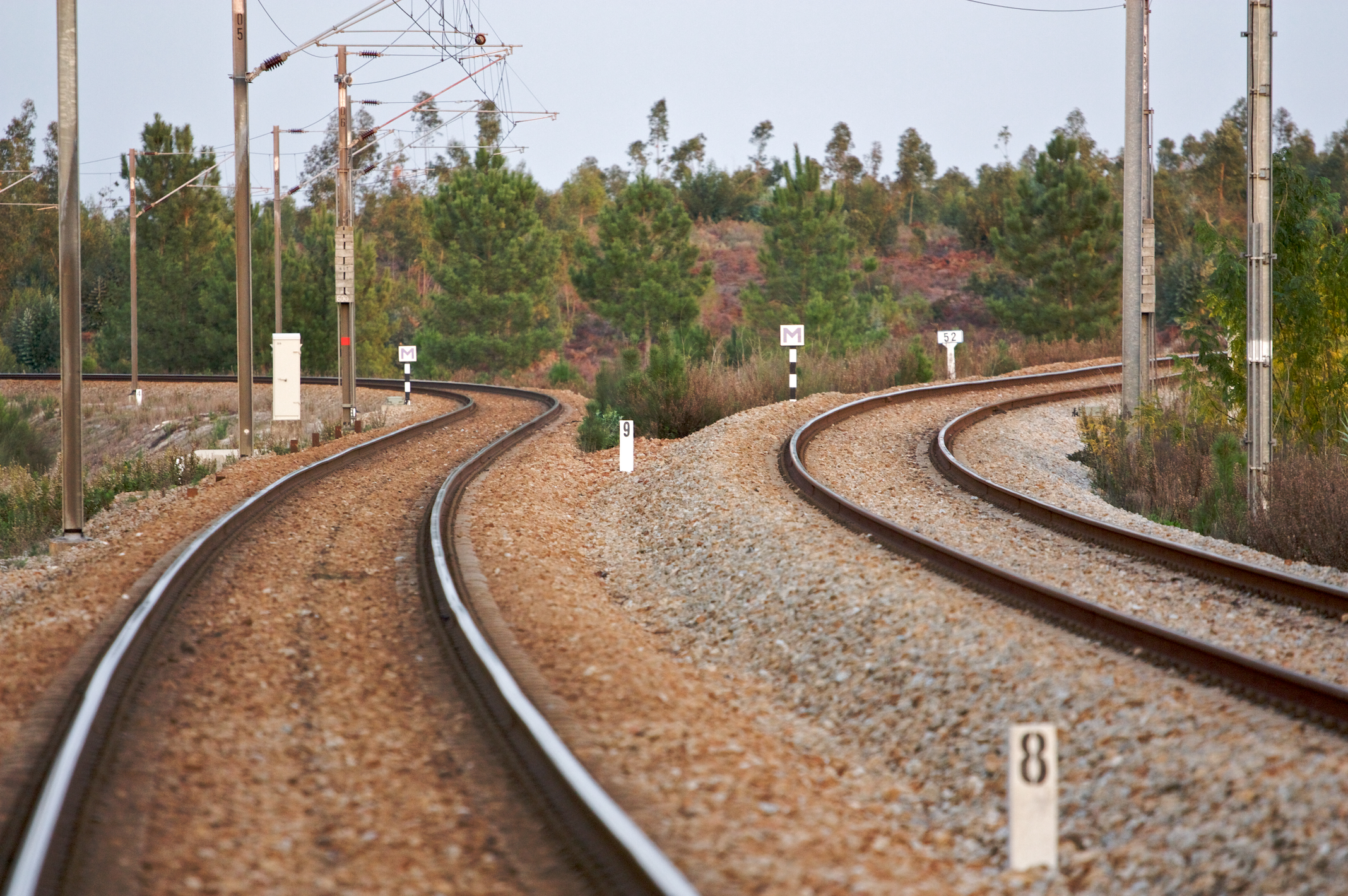 à esquerda, a Concordância de Bombel. à direita, a Linha do Alentejo. Via férrea: Concordância de Bombel [PK 0] • Linha do Alentejo [PK 51] Local: Estação de Bombel Data e hora: 11 de Novembro de 2009 [18h18] Sentido: Vidigal e Funcheira